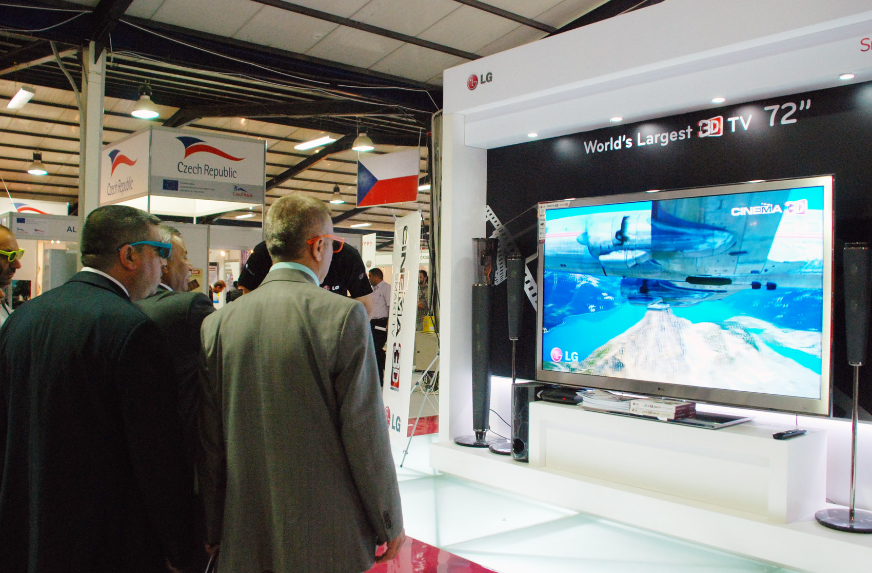 Lg전자 부스에서 관람객들이 세계에서 가장 큰 Lg전자 72인치 시네마 3d tv를 관람하고 있다.